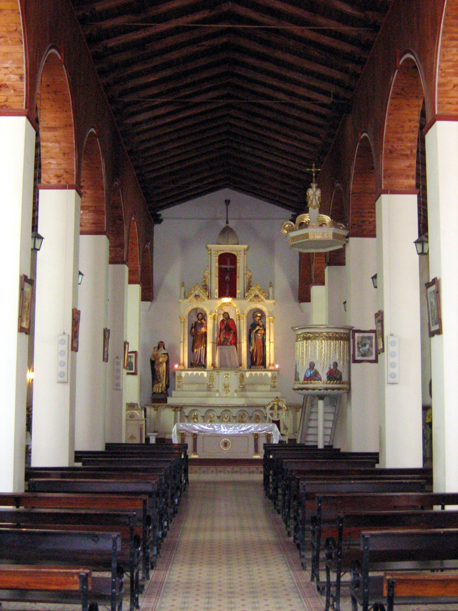 Capilla del Señor de la Humildad, municipio de Santa Rosa de Osos, Antioquia, Colombia.